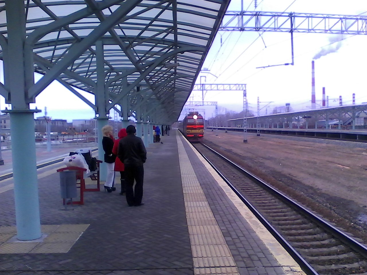 Прибытие поезда Москва-Барнаул на перон "Северного вокзала" в Казани. 11.04.2015 года в 08.01 час